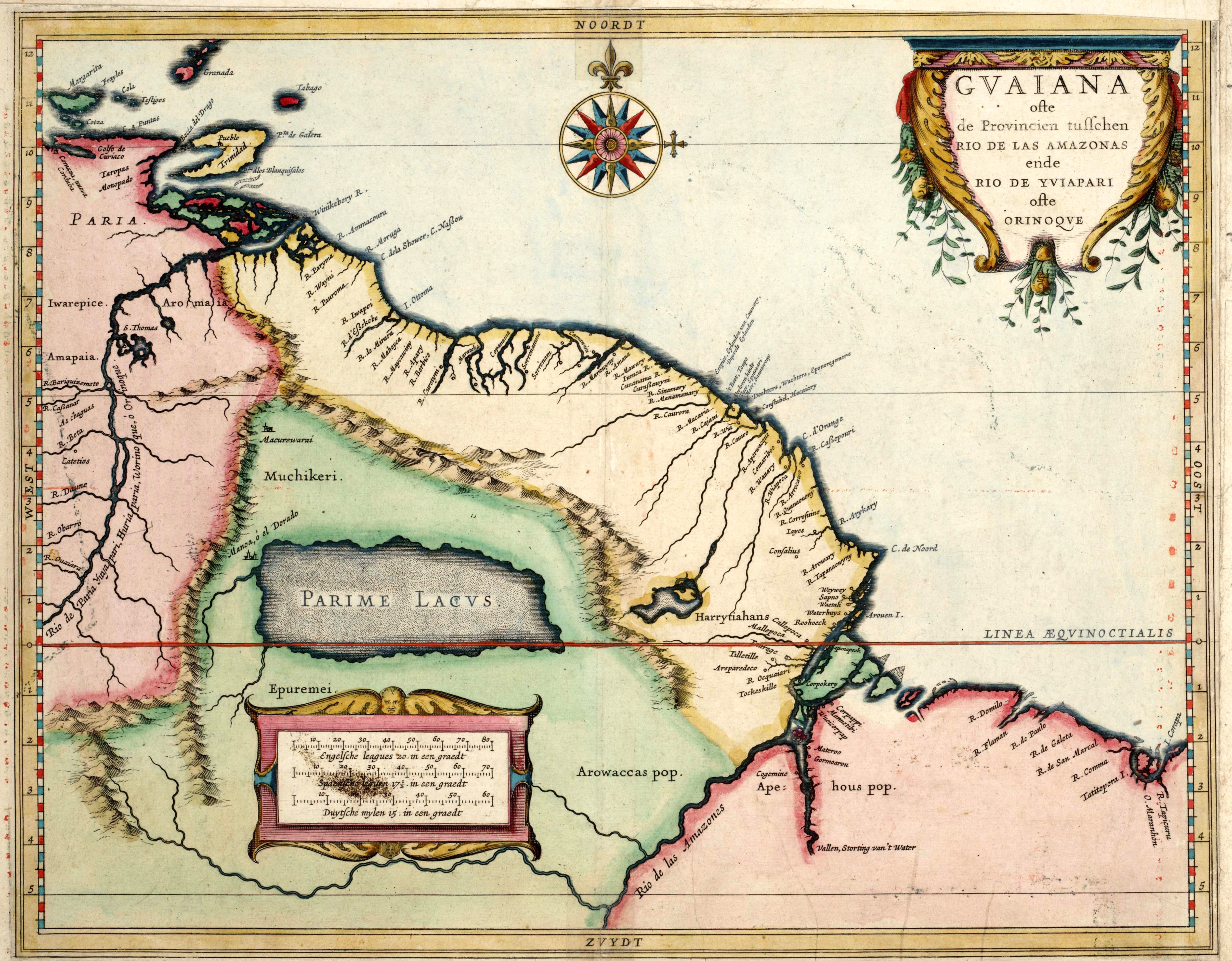 Guaiana ofte de Provincien tusschen Rio de las Amazonas ende Rio de Yuiapari ofte Orinoque